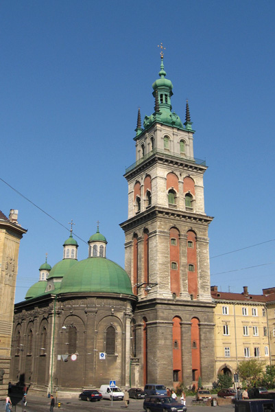 Успенська церква та Вежа Корнякта у Львові